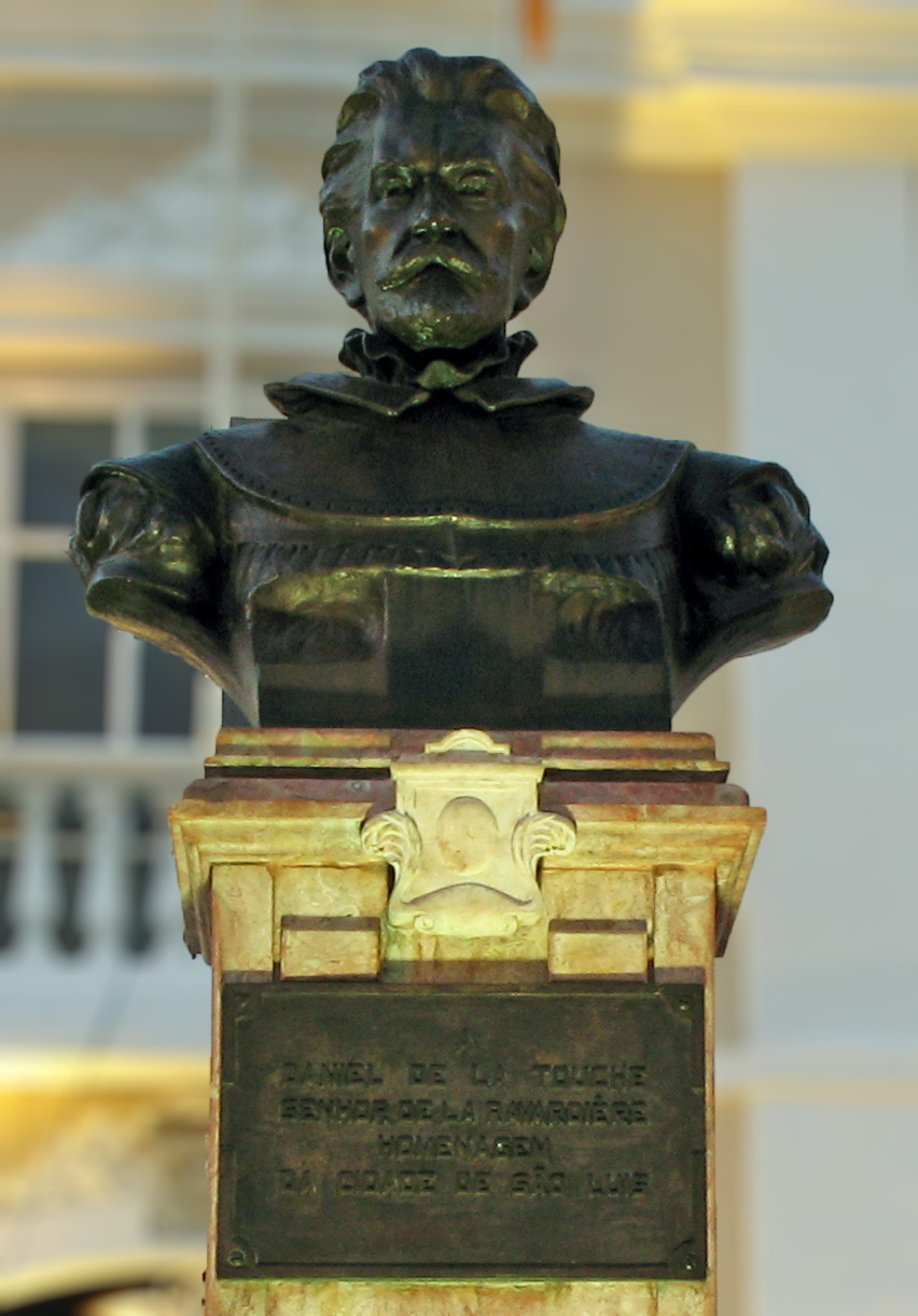 Daniel de La Touche, sob o título de Senhor de La Ravardiére, foi um experiente capitão da Marinha Francesa do século XVII. Nobre, de religião protestante, liderou a expedição francesa que, em 1612, deu início as pretensões de colonização no Norte do Brasil. Denominada de França Equinocial, teve seu marco na fundação do "Fort Saint Louis" (Forte de São Luís), que para alguns historiadores viria a ser a cidade de São Luís, capital do Maranhão.